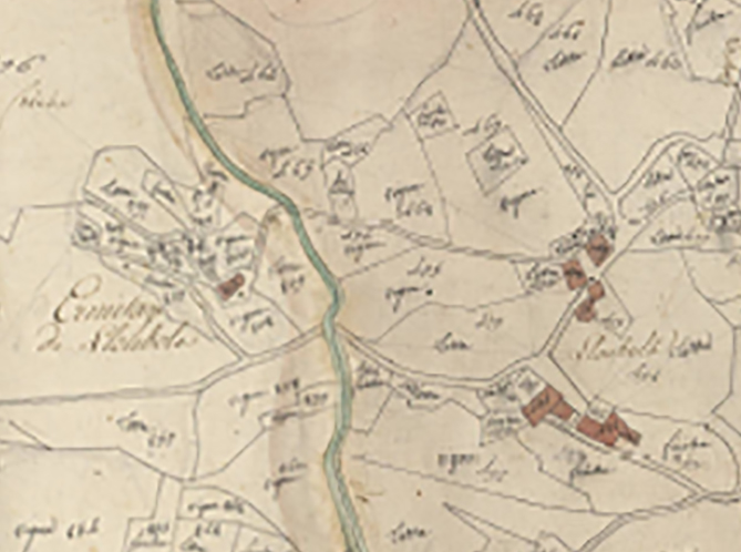 Llúgols, de Rià i Cirac, en el Cadastre napoleònic del 1812 (Arxius Departamentals dels Pirineus Orientals, ADPO)